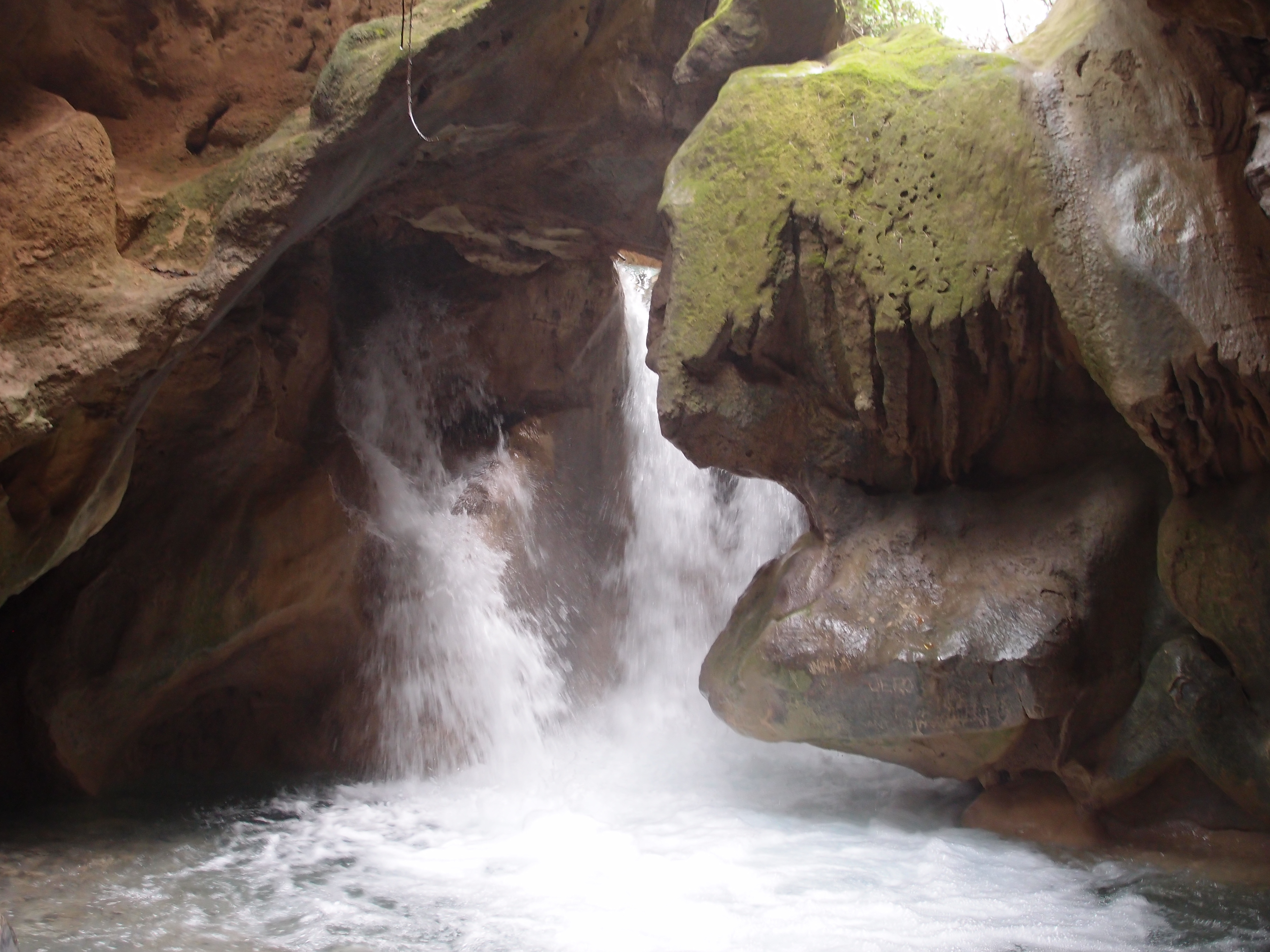 Cascada de agua en la cueva del Agua del río Cuadros.